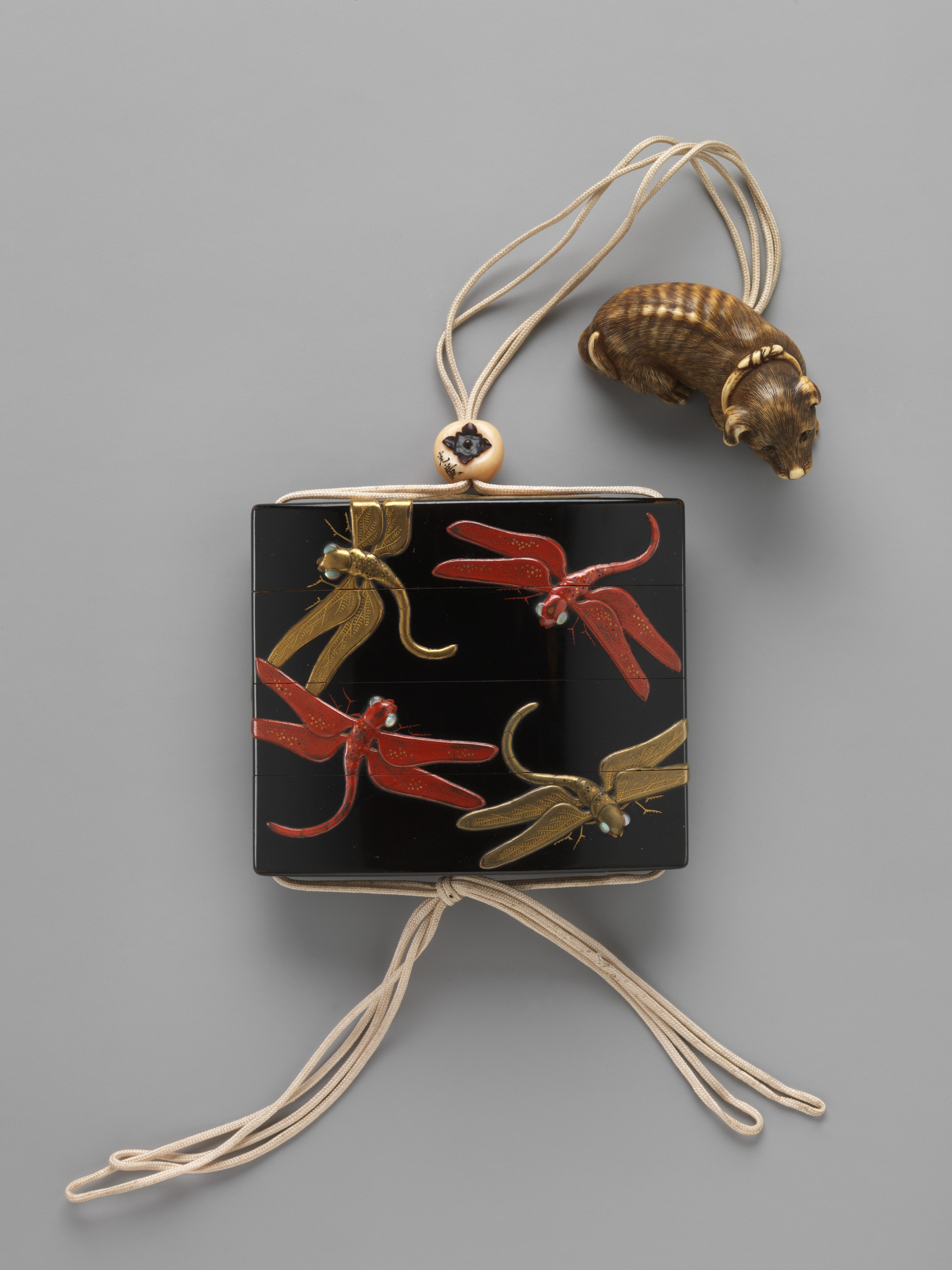 Japan; Inrō; Inrō